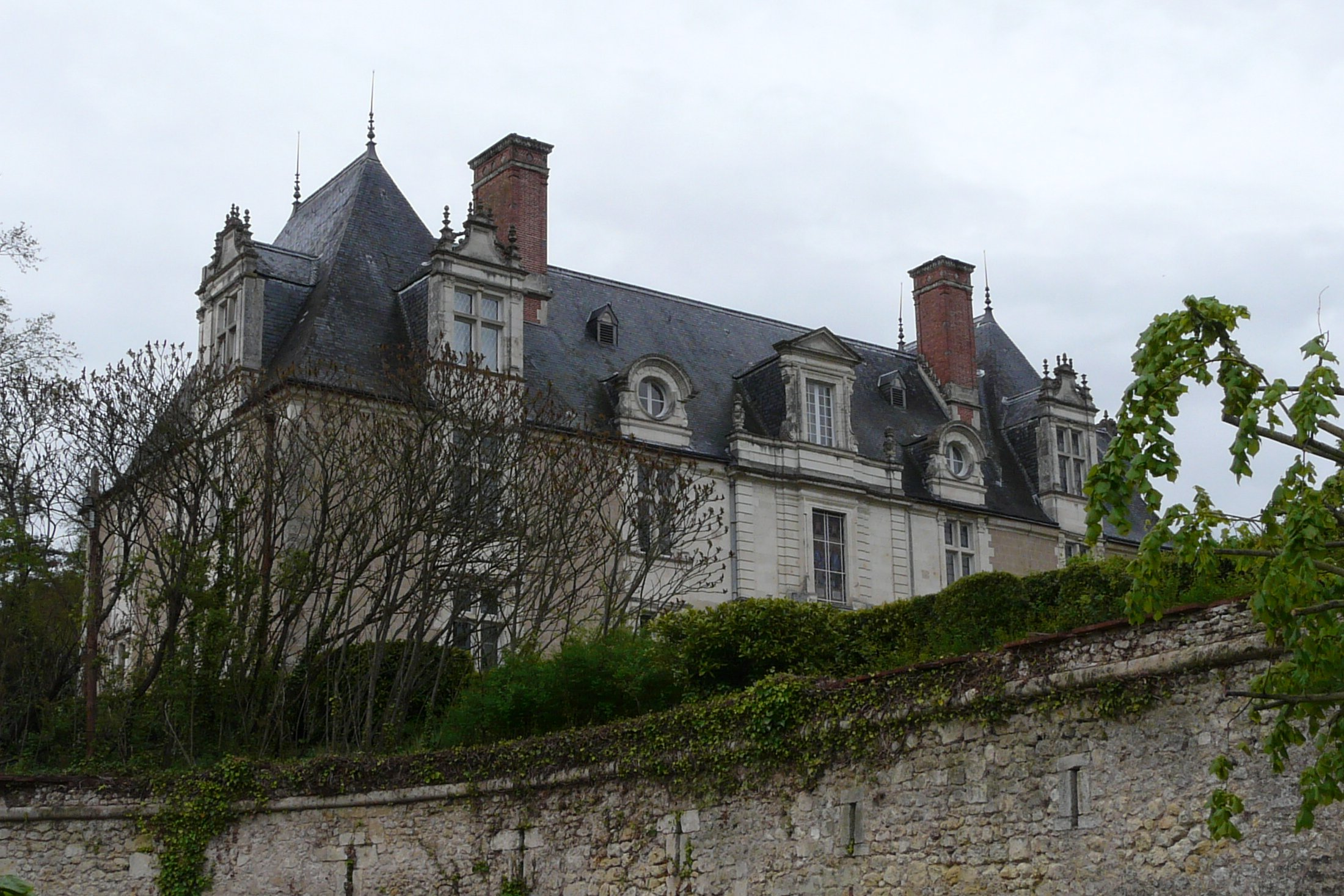 Chateau de Noizay